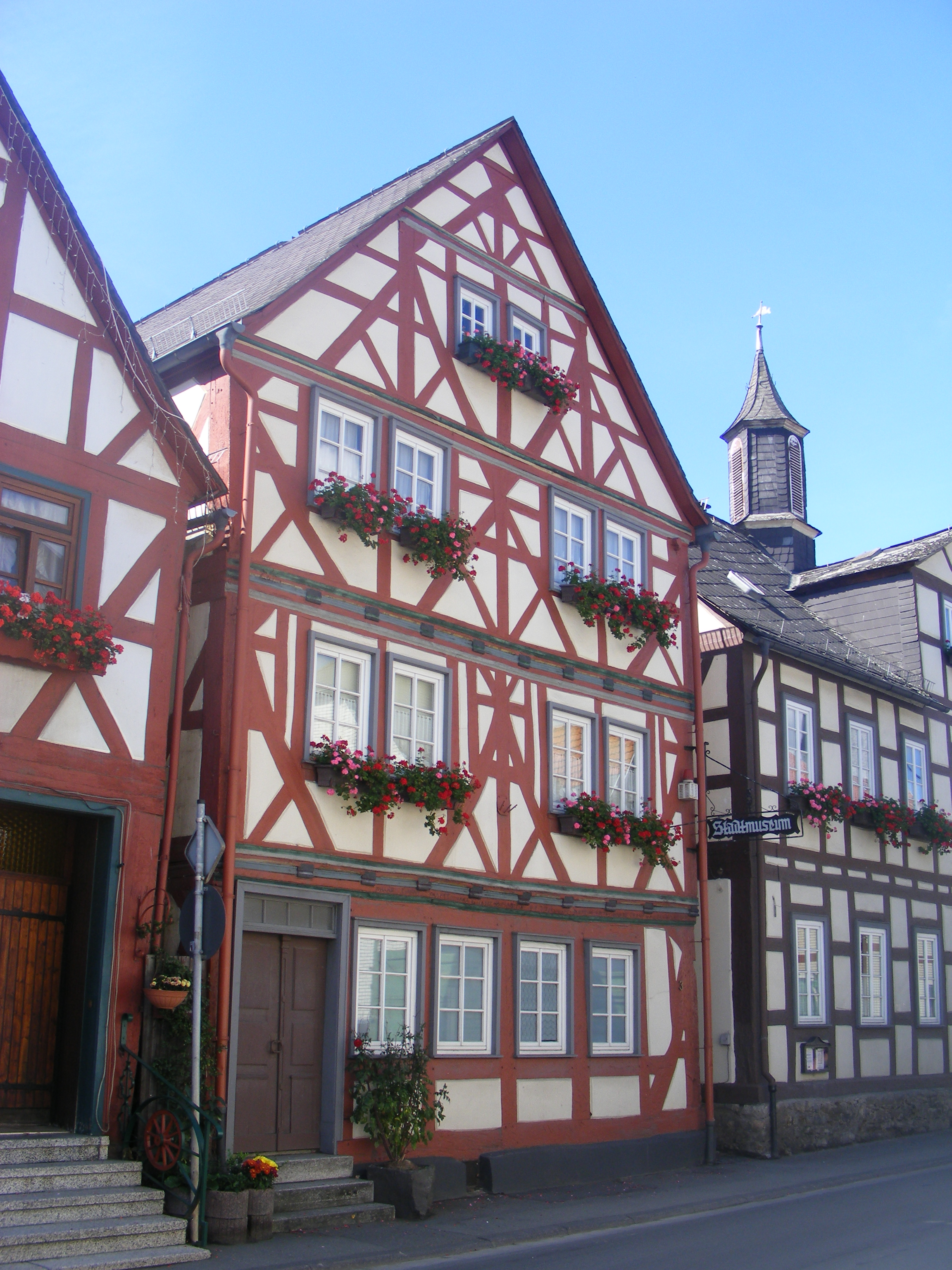 Wohnhaus